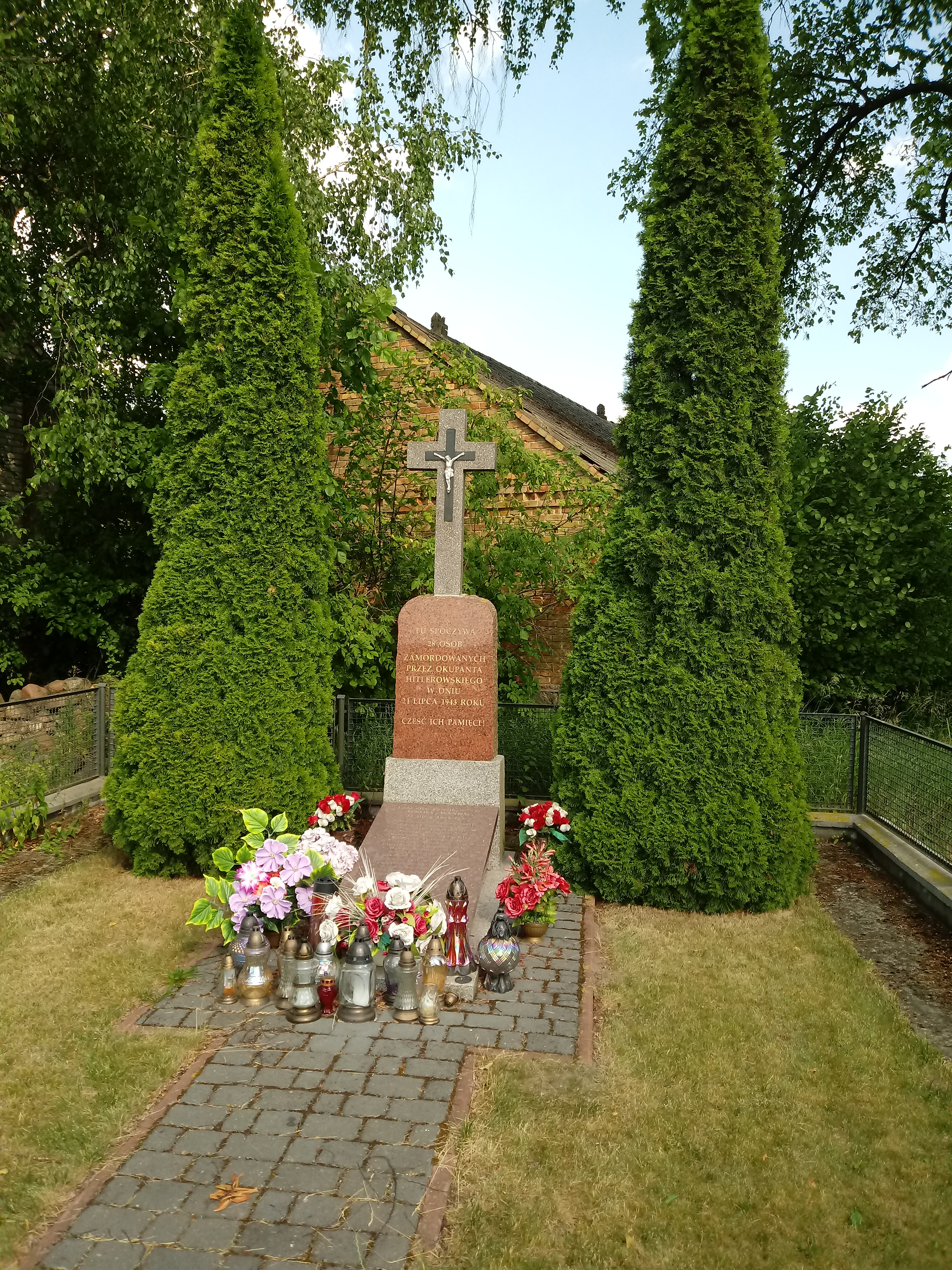 Krzyż, zbiorowa mogiła w miejscu kaźni i całkowicie spalonej wsi 21 lipca 1943 roku.